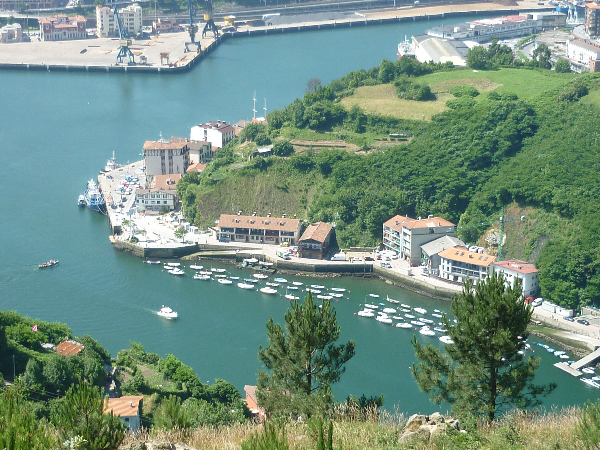 Pasai San Pedro Arrokaundietatik